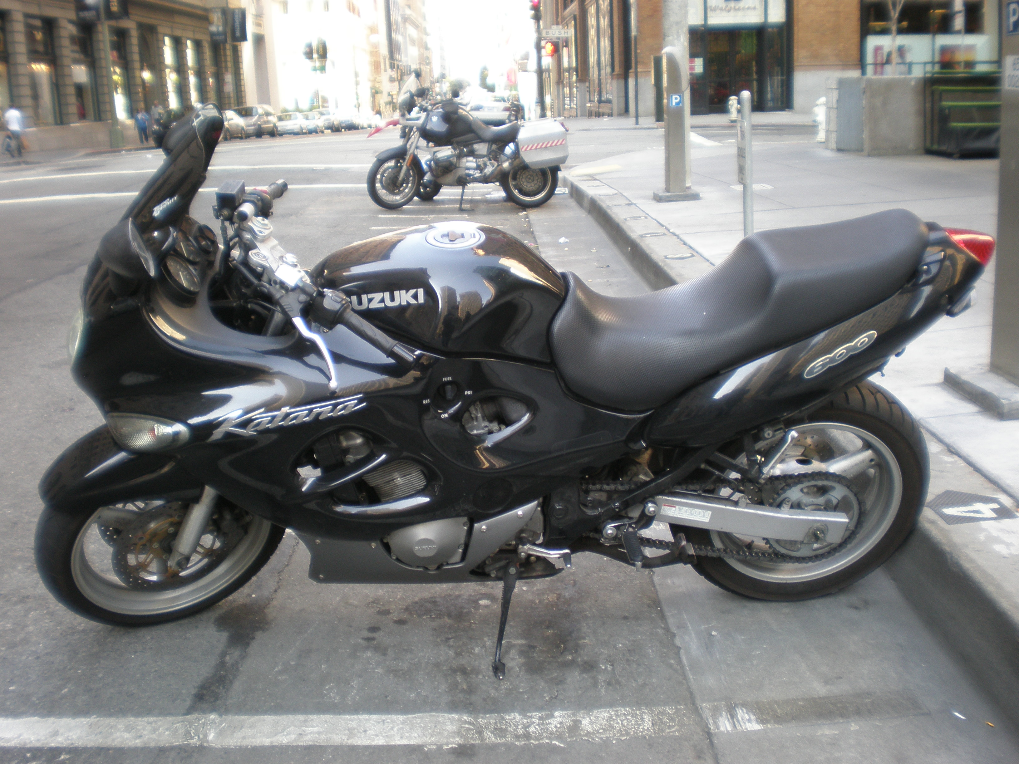 A Suzuki Katana 600 in San Francisco.